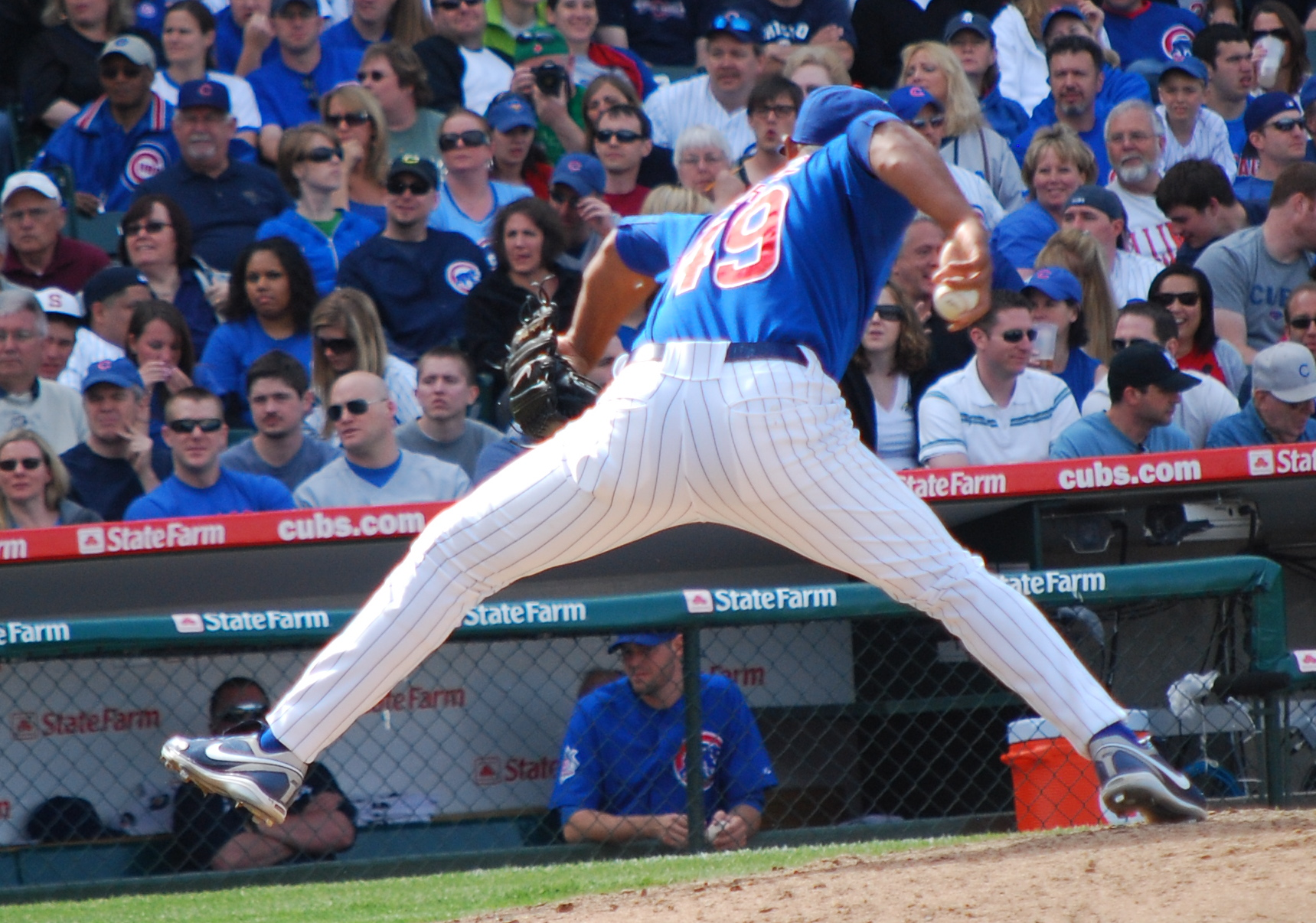 サイドスローで投球するカルロス・マーモル. Description